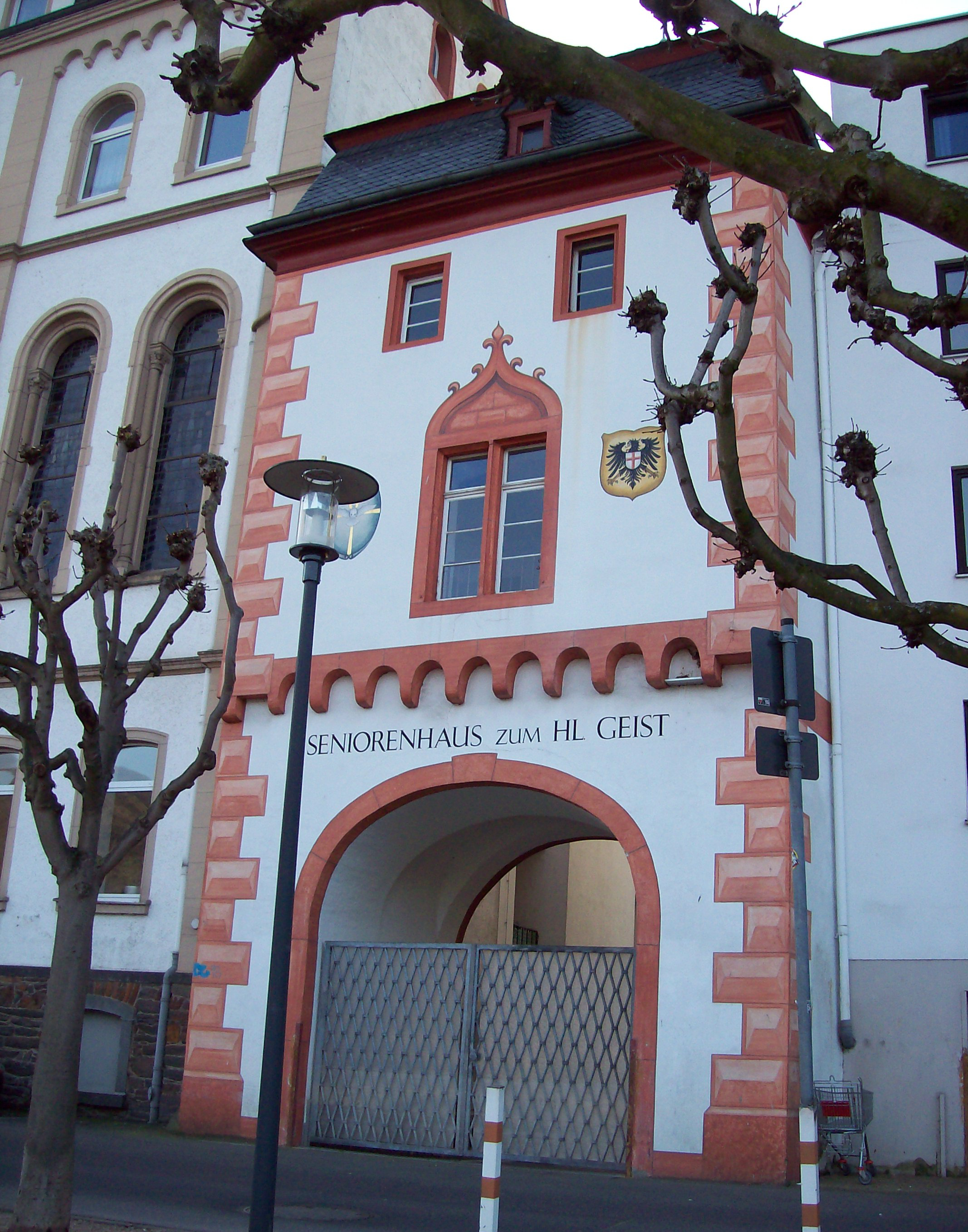 Das Hospitaltor, ehemaliges Tor der mittelalterlichen Stadtbefestigung von Boppard, steht unter Denkmalschutz und wurde daher beim Umbau des Altenheims in dieses integriert.